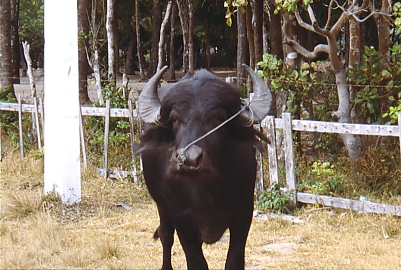 Wasserbüffel